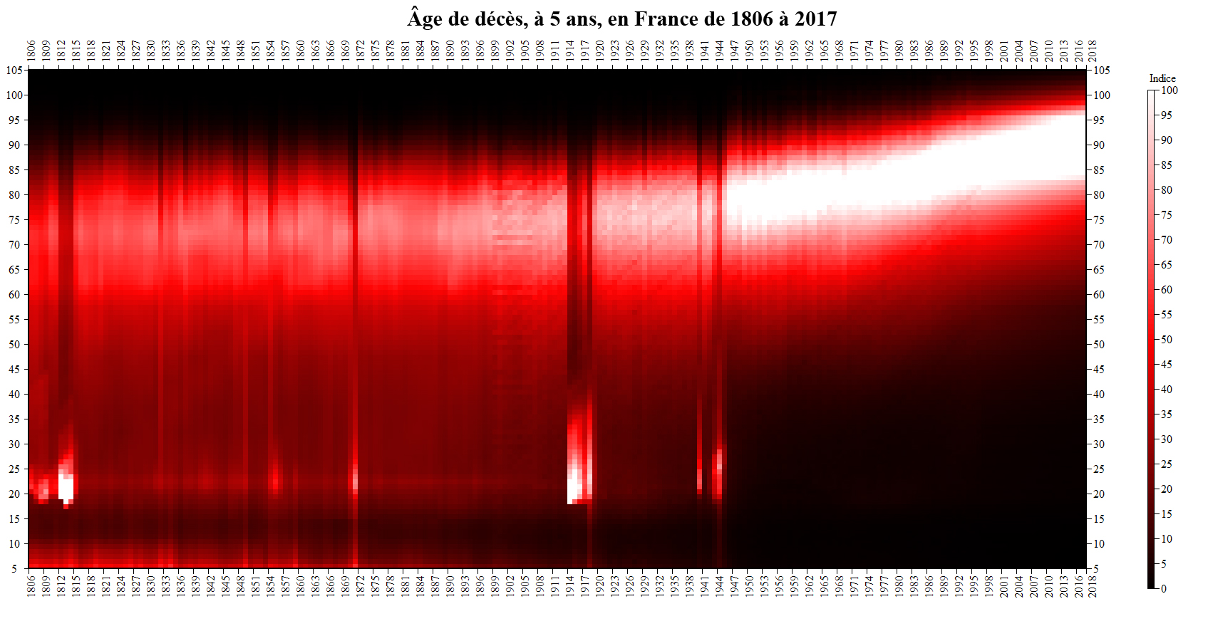 Évolution d'âge de décès à 5 ans en France de 1806 à 2017 (Source: INED) Indice proportionnel au pourcentage de décès (100 = 3 225 morts sur 100 000). Légende: Indice du pourcentage de morts d'une année en fonction de l'âge. Cette indice est indépendant de l'année, 100 indique un pourcentage de mort pour 100 000 morts, 50 indique la moitié de ce pourcentage. (ex: sur toute les années, le plus fort tôt de mortalité était en 1871 pour les moins d'un an, 22 657 morts sur 100 000; en 2017 pour les 89 ans, il y a 4 607 morts sur 10 000; en 1806 pour les 66 ans, il y a eu 1 174 morts; si 100 = 3 225 morts sur 100 000, 1871 pour 0 an est au dessus de 100, 2017 pour 66 ans est au dessus de 100, les deux sont tronqué à l'indice 100, 1806 pour 66 ans est 36,4% de 3 225 morts) Blanc = 100 dans l'année en ordonnée pour l'âge en abscisse. Rouge = 50 dans l'année en ordonnée pour l'âge en abscisse. Noir = 0 dans l'année en ordonnée pour l'âge en abscisse.